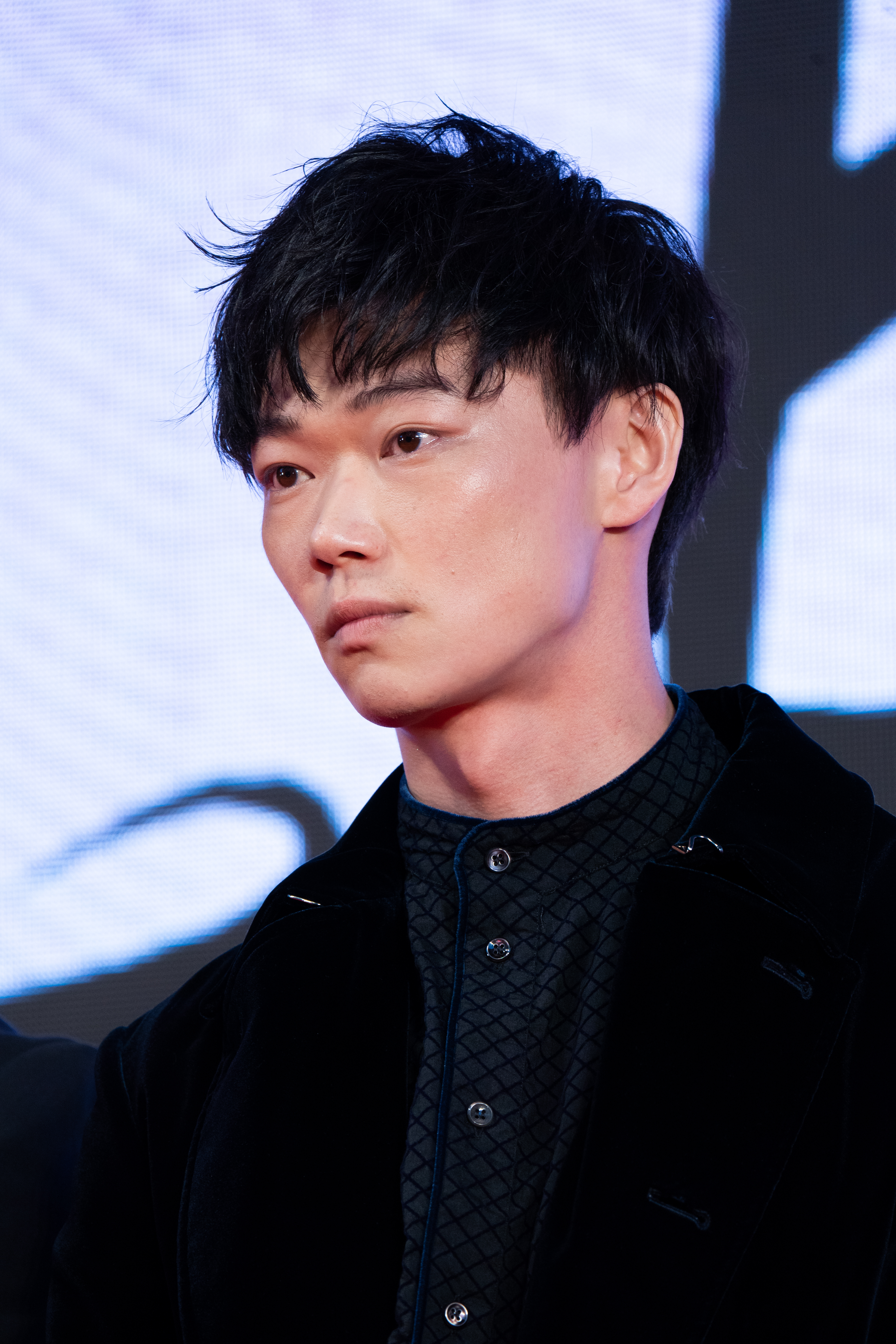 第32回 東京国際映画祭 オープニングセレモニー 笠松将 (花と雨)